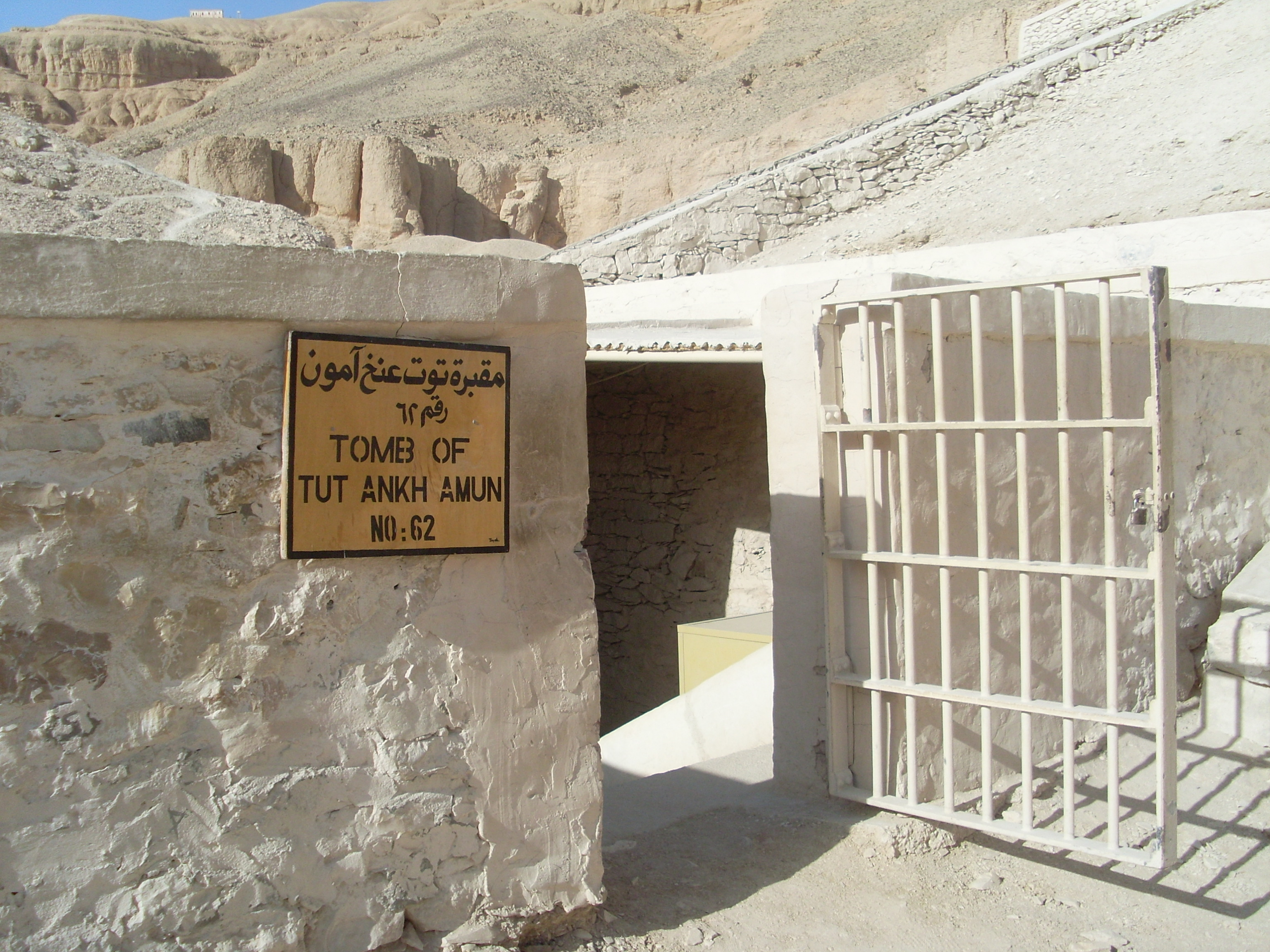 Valle de los Reyes, Egipto, entrada de la tumba de Tutamkhamon, abril de 2009